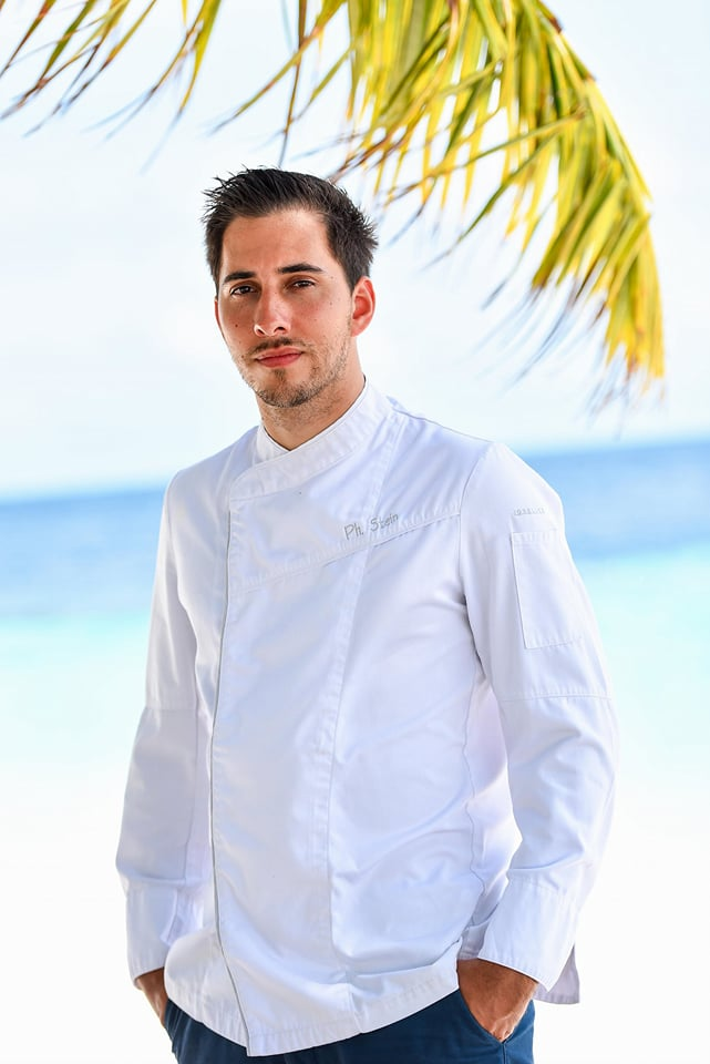 Philipp Stein (2016)